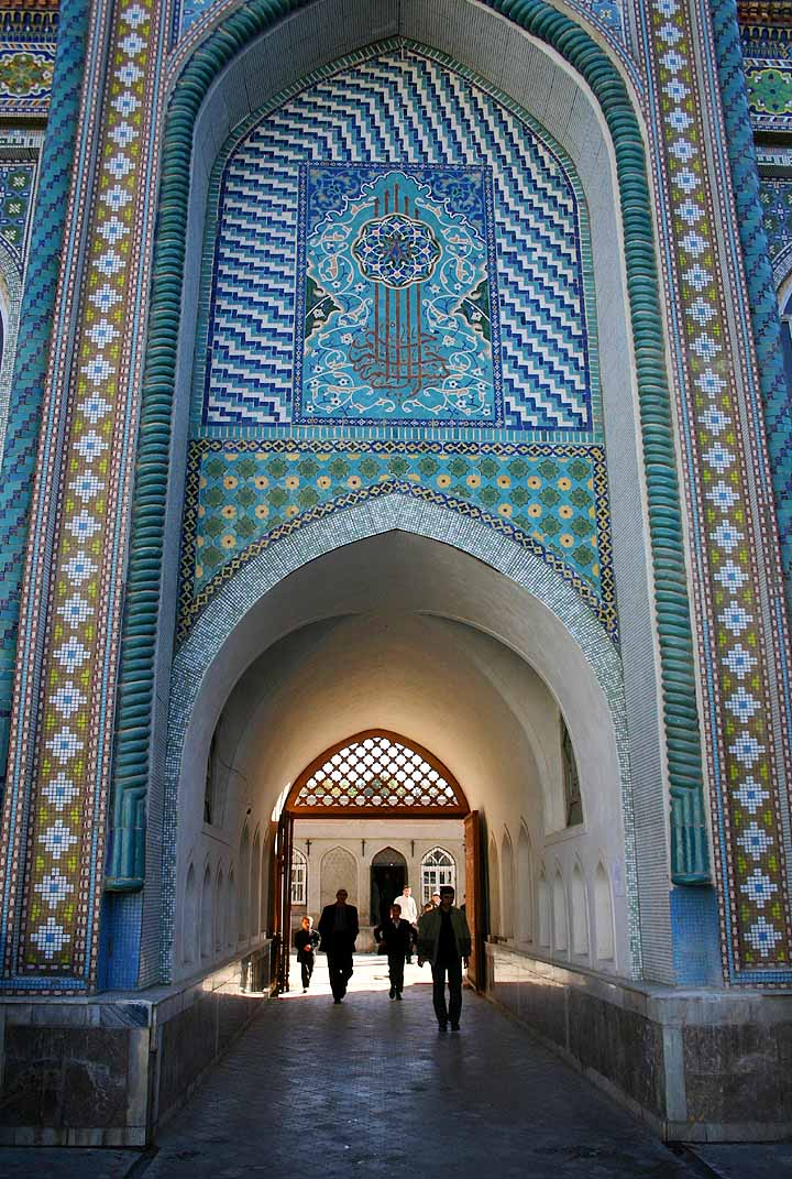 Главная мечеть Имама Тирмизи, Душанбе Тоҷикӣ: Масҷиди Имом Тирмизӣ, Душанбе